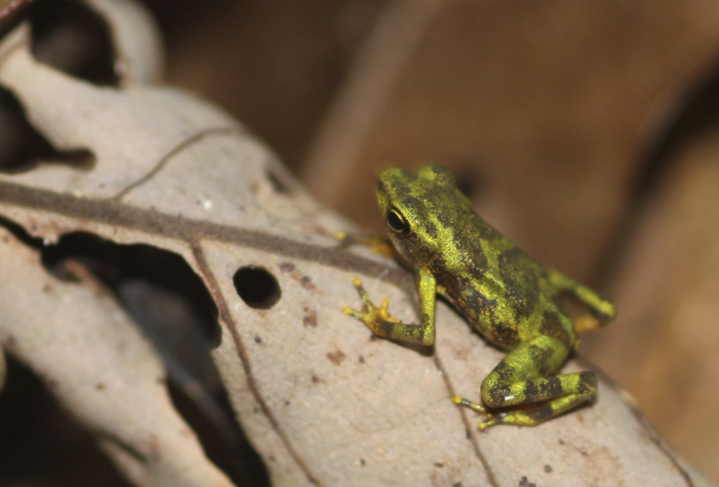 Juvenile Atelopus limosus, Panama